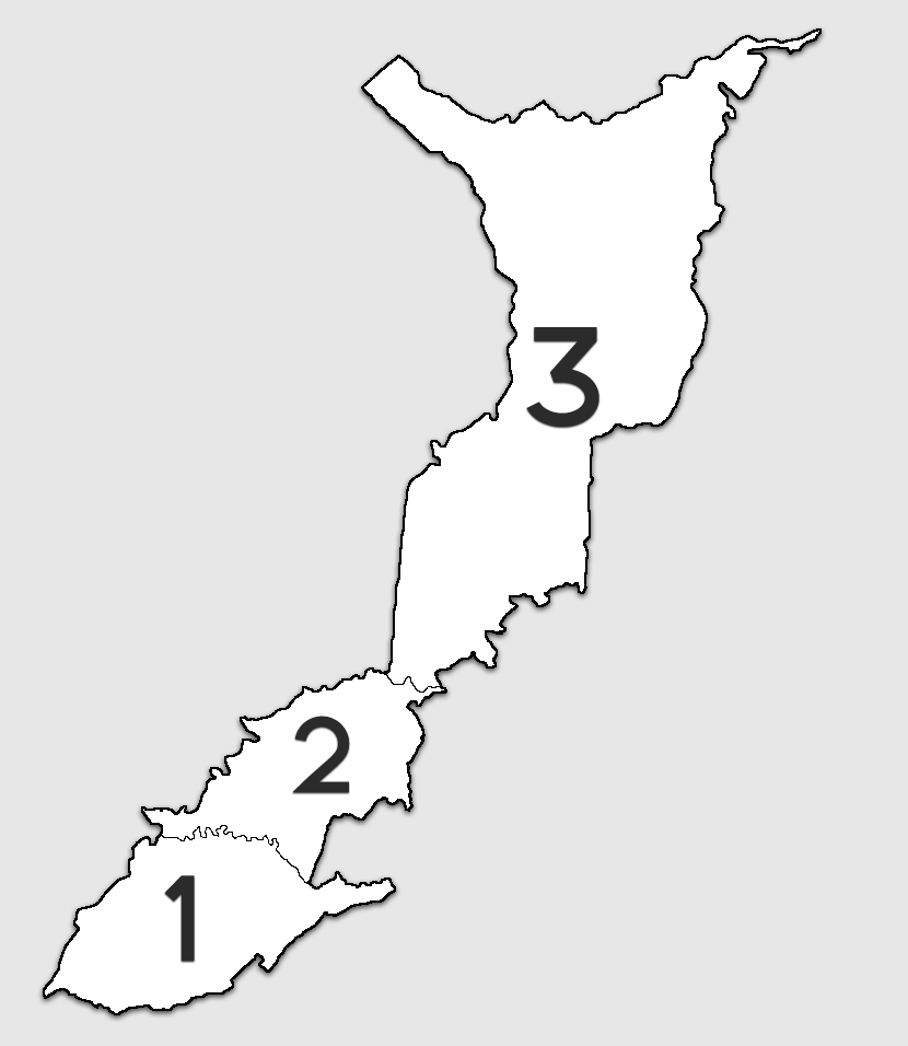 Divisiones administrativas del cantón de Moravia, Costa Rica.